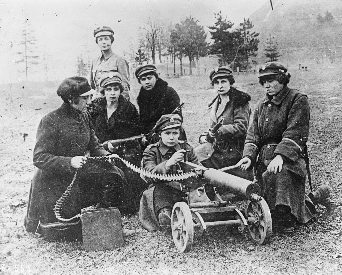 Femmes d'un bataillon polonais. Guerre russo-polonaise, août 1920.